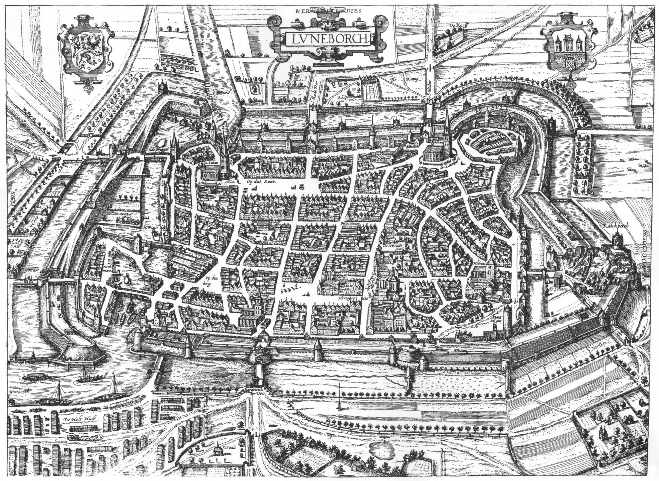 „Grundriß von Norden“, um 1598 (Kupferstich bei Braun & Hogenberg), [späterer] Nachdruck, o. J., 26,8 x 36 cm